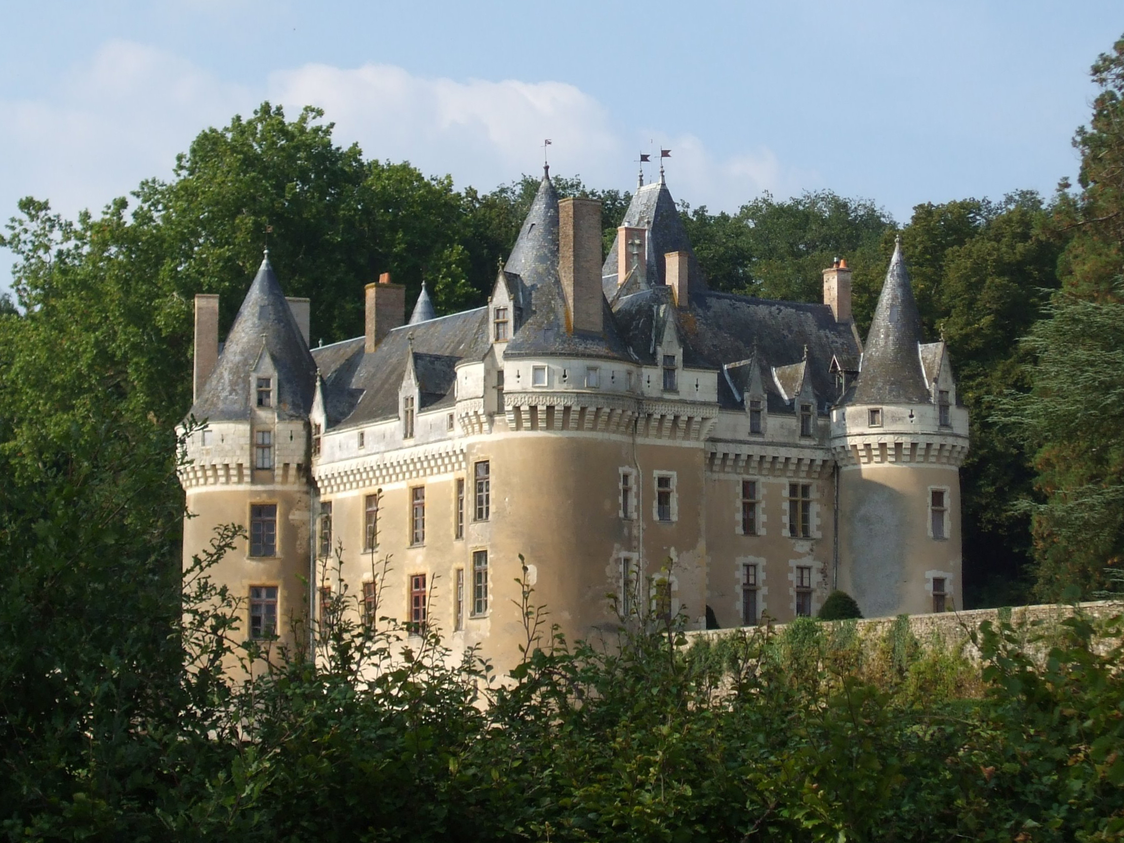 Château de Gallerande sur la commune de Luché-Pringé dans le département de la Sarthe en France